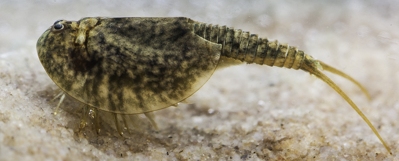 Skjoldkreps (Lepidurus arcticus) er en krepsdyrart som lever i stillestående ferskvann. Den tilhører skjoldkrepsene, som har endret seg lite siden trias for over 200 millioner år siden. Foto: Per Harald Olsen